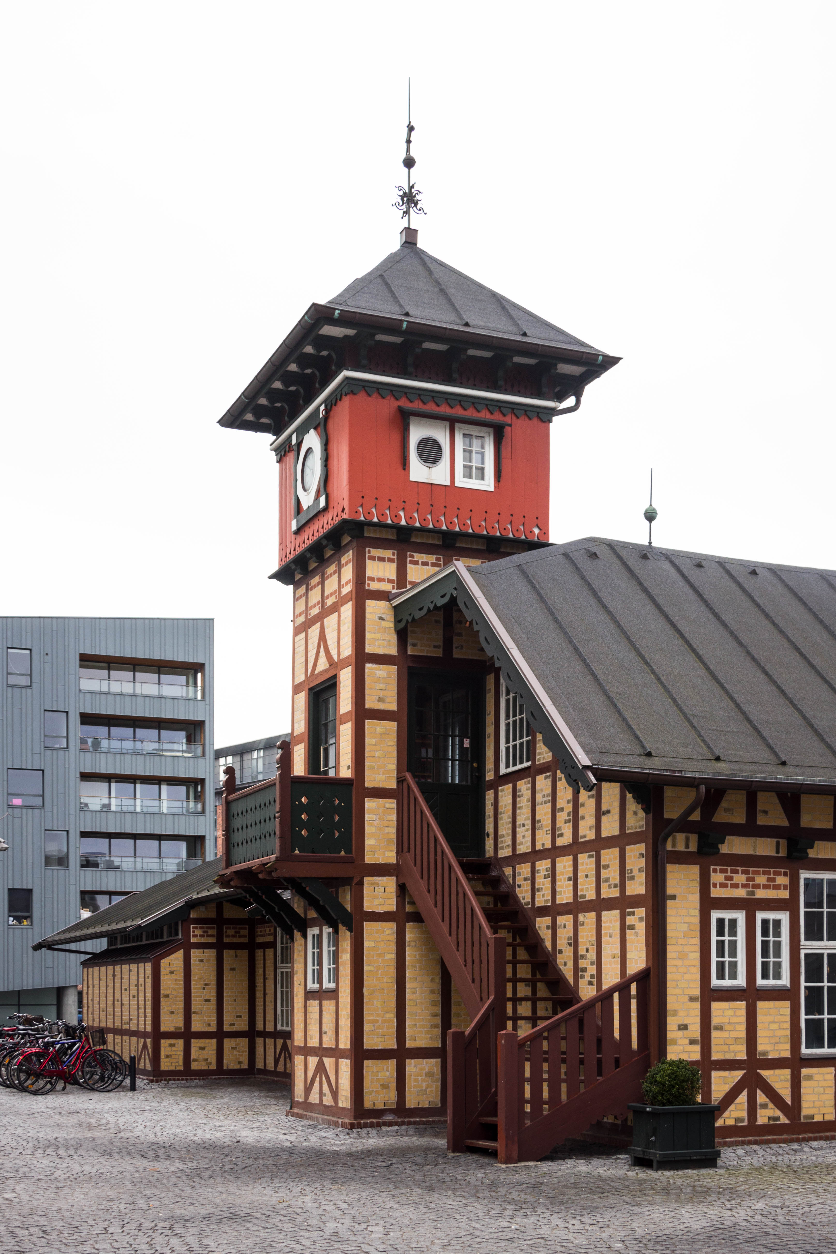 Former station Building on Amerika Plads in Copenhagen, Denmark